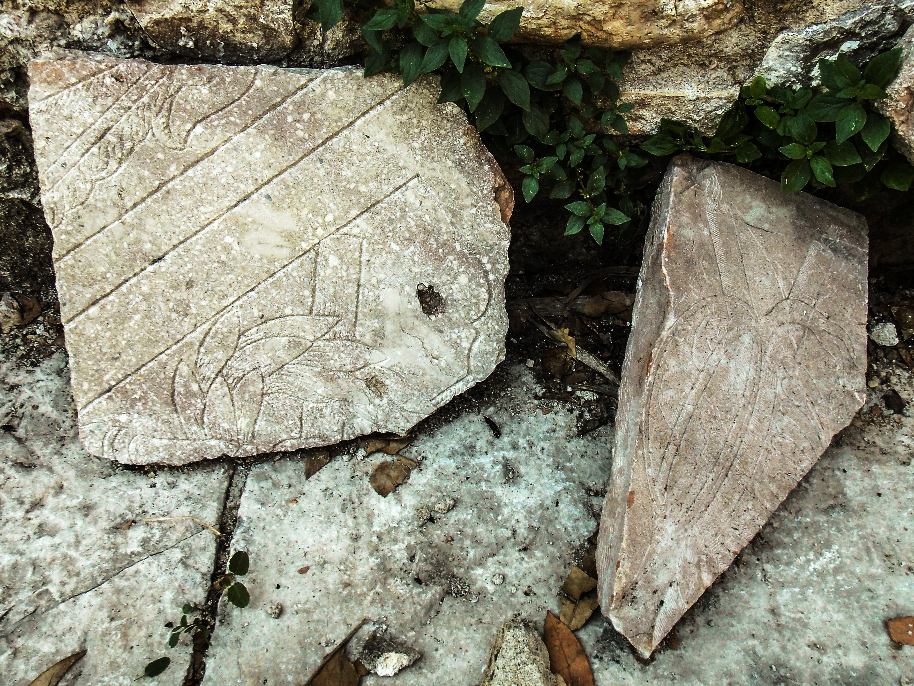 Ex cimitero dei Morticelli, Benevento. Alcuni resti delle lapidi.